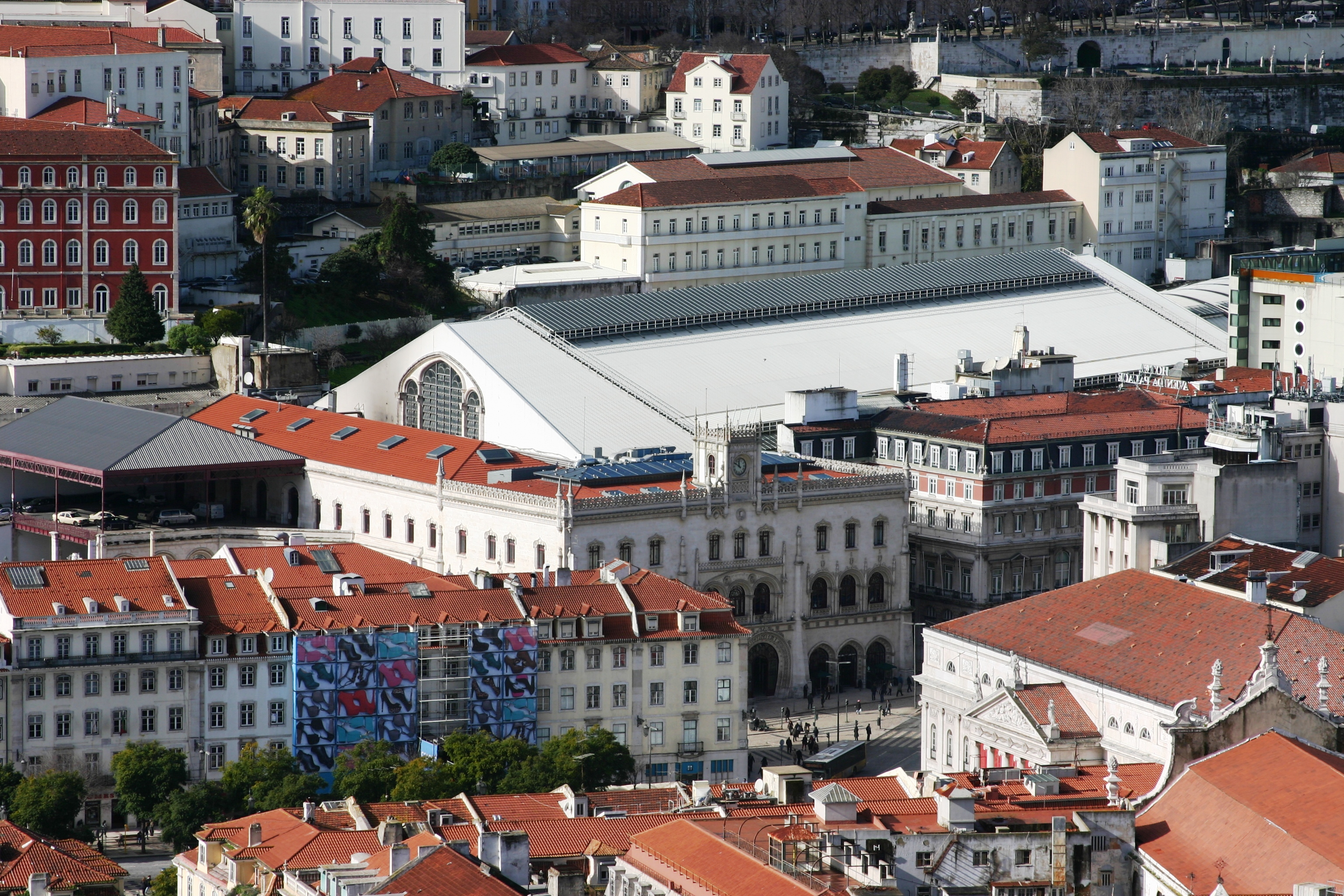 Vista de Lisboa a partir do Castelo de São Jorge - Estação do Rossio